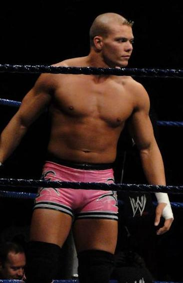 Kidd in uno House Show.